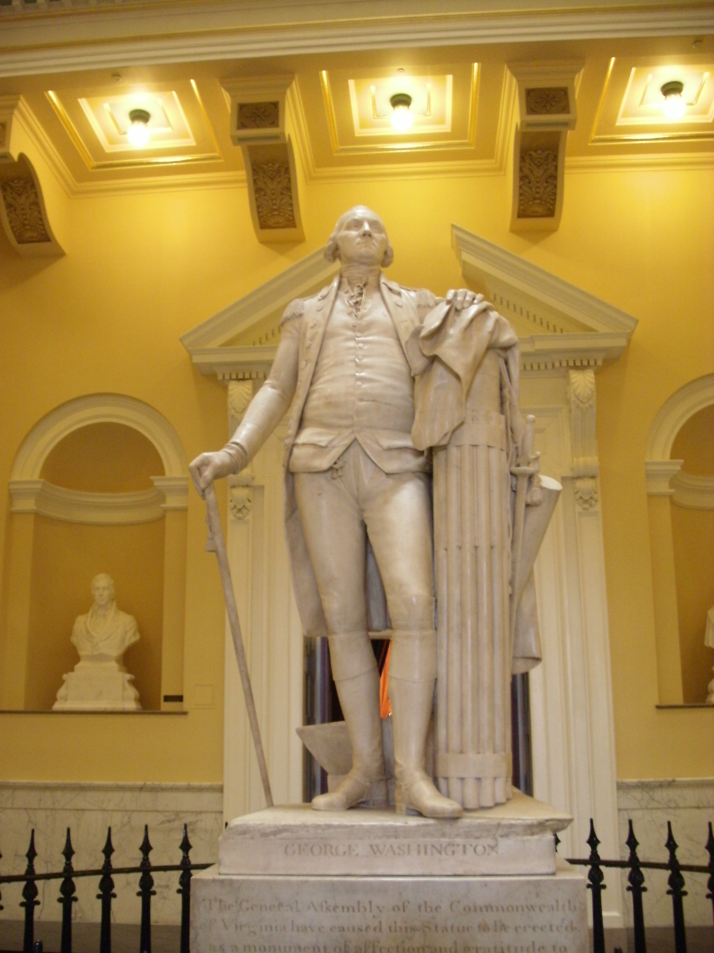 Virginia State Capitol, Richmond, VA GEDSC DIGITAL CAMERA